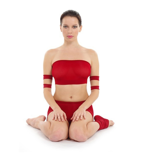 Virasana by Nina Mel, Yoga Teacher